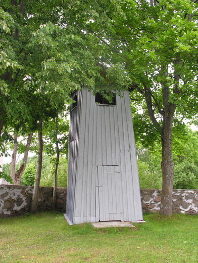 Pikelių Švč. trejybės bažnyčia Foto: Algirdas